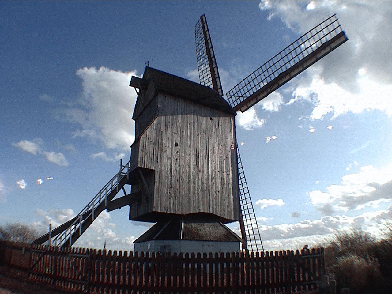 Le Noordmeulen, "moulin du nord", Steenvoorde, France.